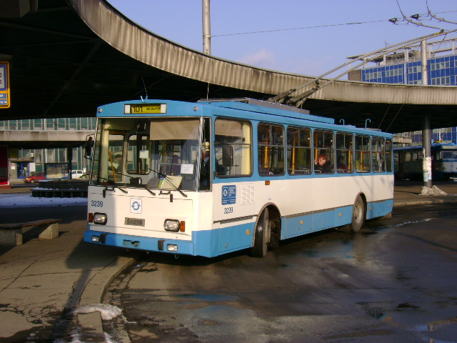 Ostravský Trolejbus Škoda 14Tr v smyčce Hlavní nádraží